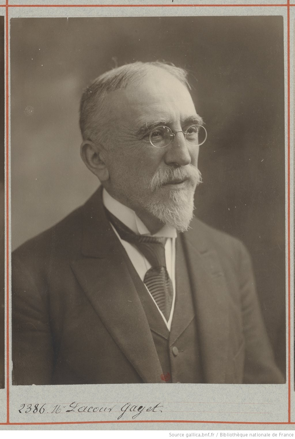 Georges Lacour-Gayet, né le 31 mai 1856 à Marseille et mort le 8 décembre 1935 à Paris, est un historien français.